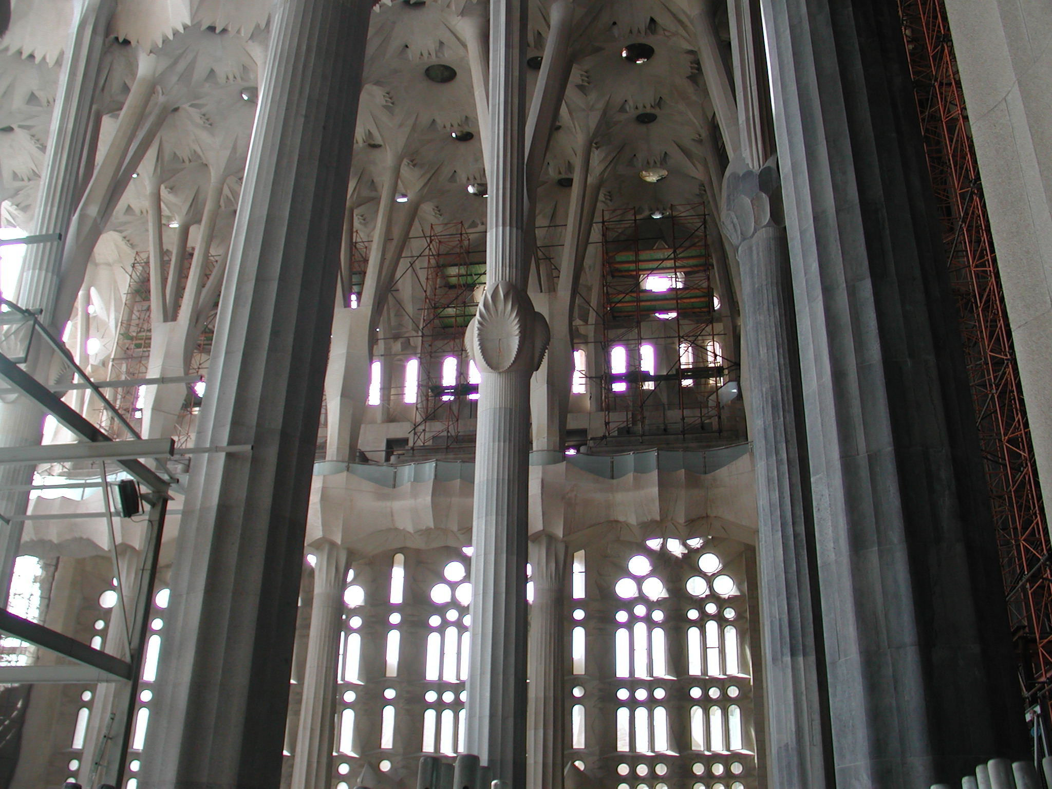 Sagrada Familia, Barcelona